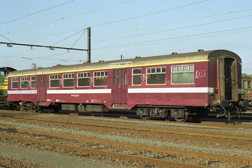 Foto genomen tijdens een opendeurdag te Saint-Ghislain aan ons museum.